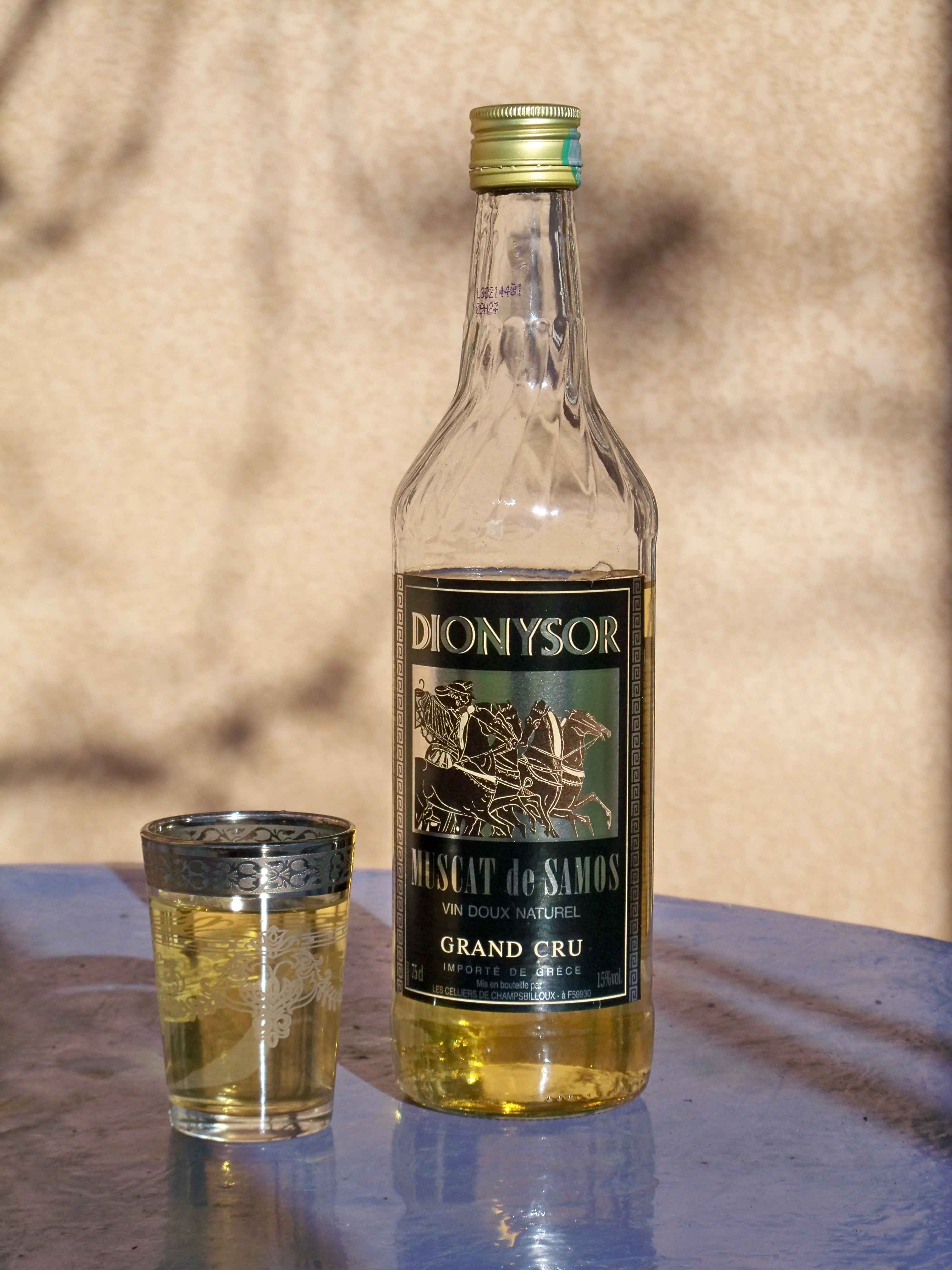 bouteille de muscat de Samos